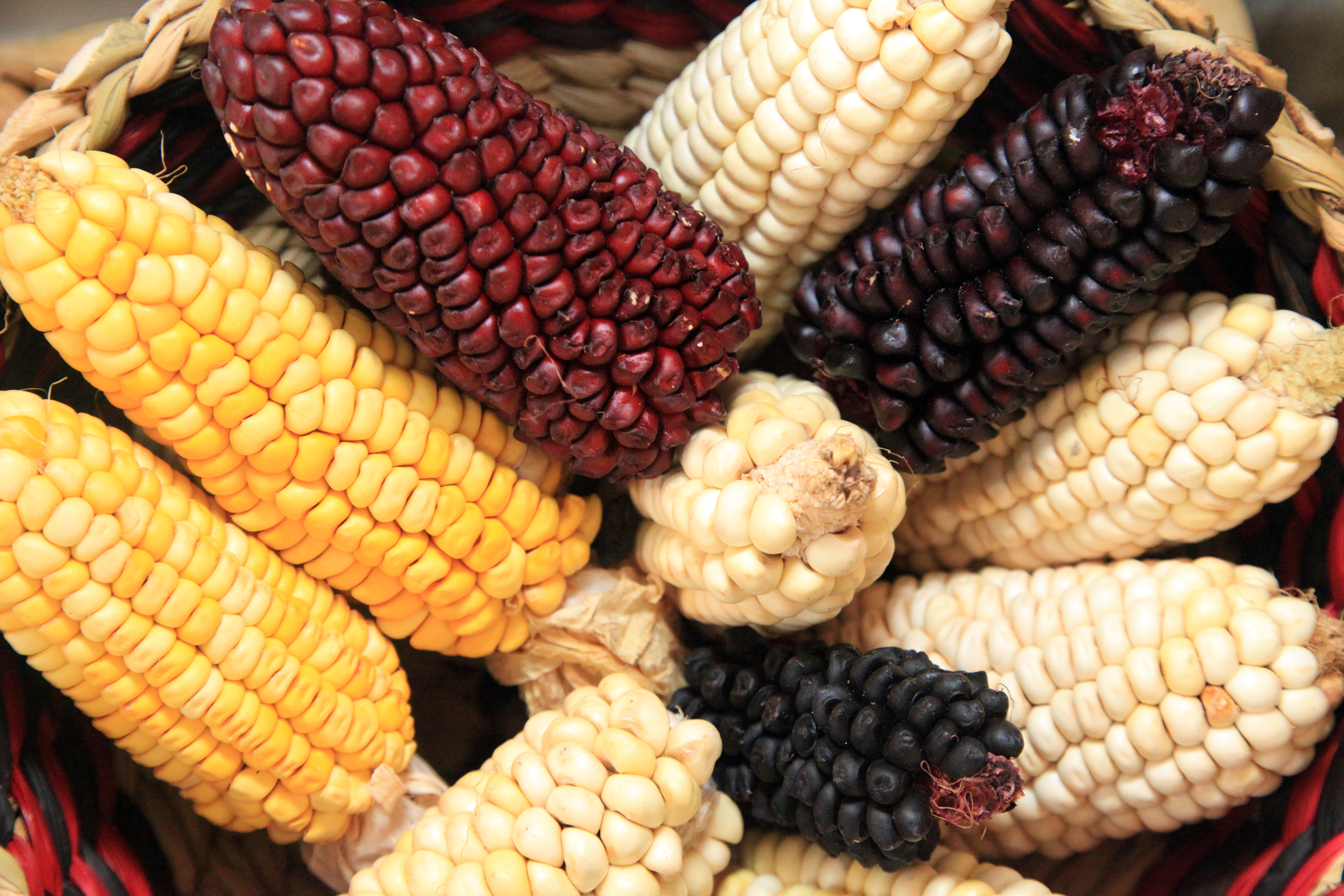 Quito (Ecuador), 24 de Agosto del 2012.-En el Ministerio de Relaciones Exteriores, Comercio e Integración se festejo el Día Internacional de los Pueblos Indígenas. Foto: Xavier Granja Cedeño/Ministerio de Relaciones Exteriores, Comercio e Integración